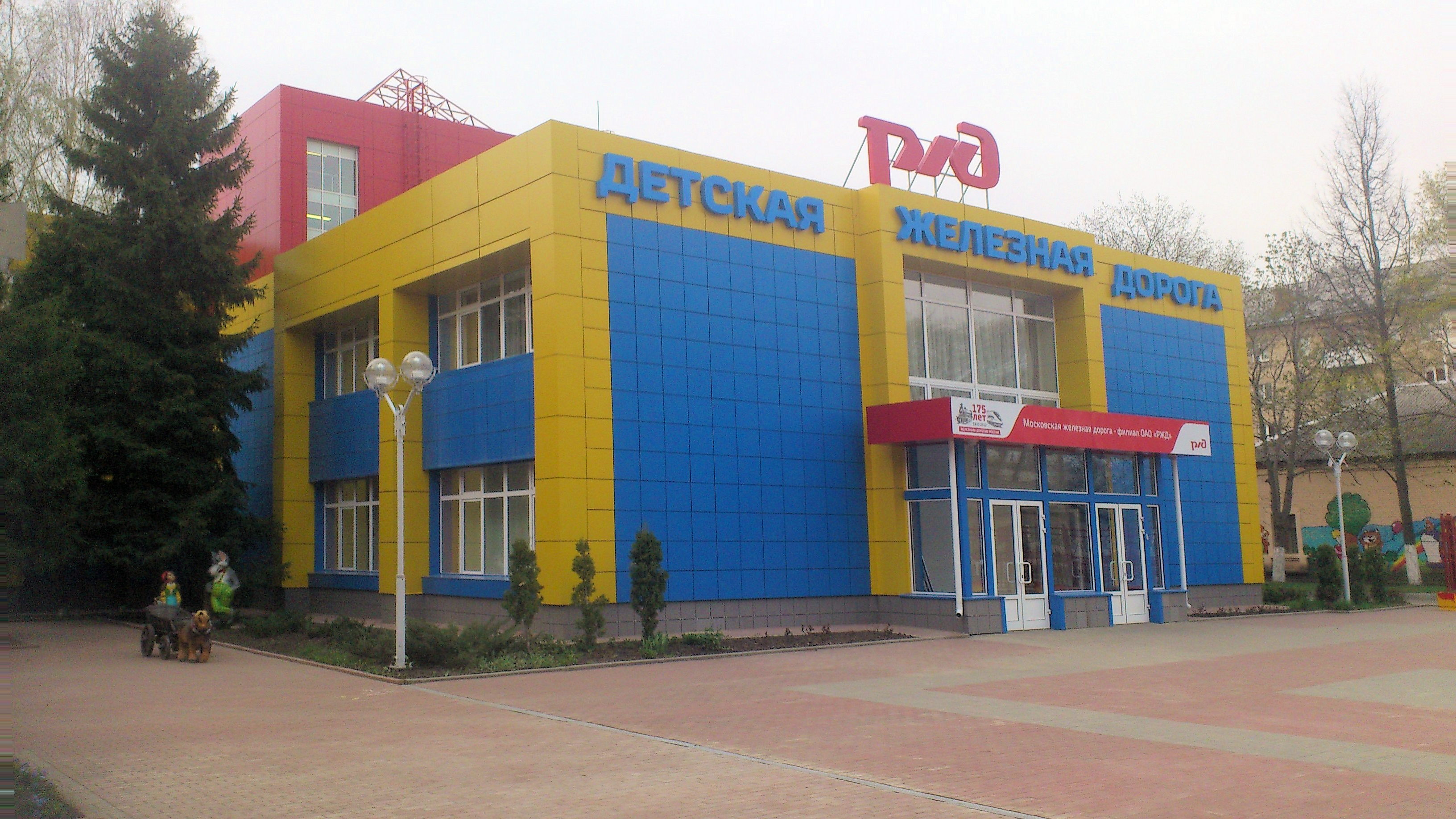 Учебный корпус Новомосковской детской железной дороги. Новомосковск, Тульская область, Россия.